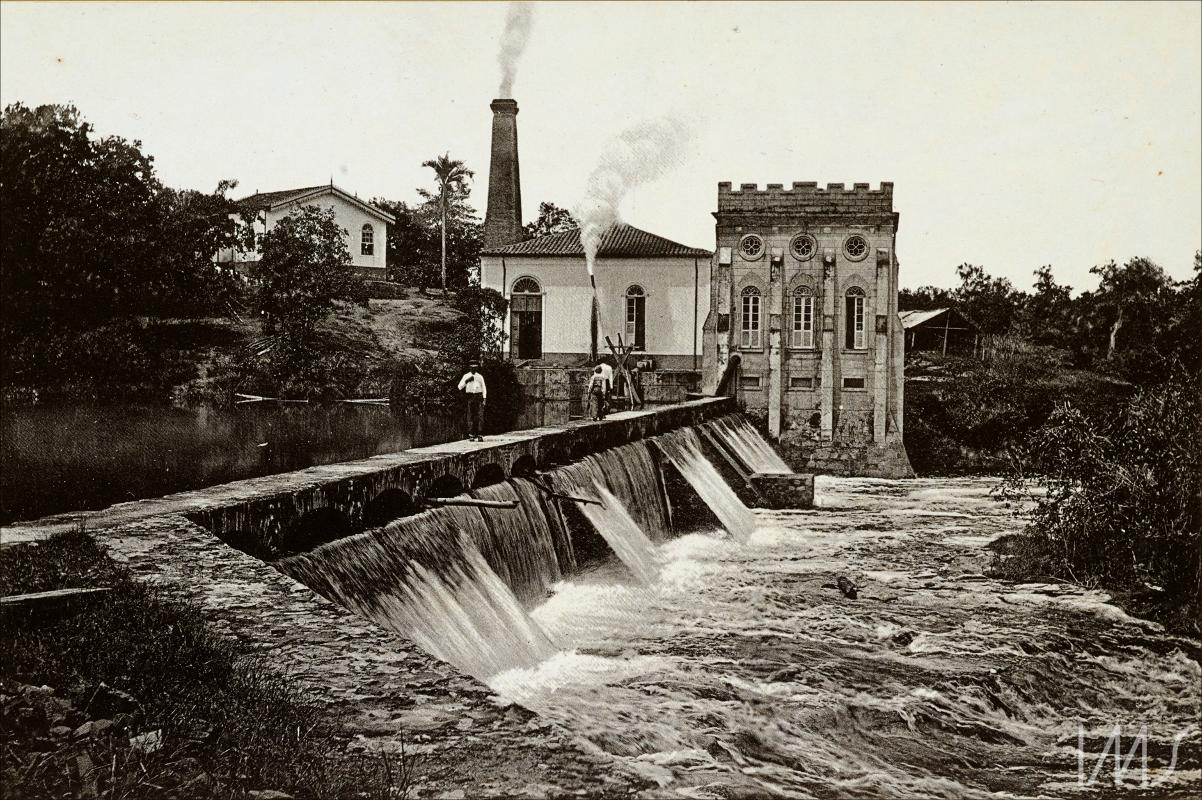 Cachoeira Grande Descrição: P&B i/sp: 9,7 x 14,6 cm Colotipia/ Pigmento Assuntos: Engenharia Cena de rua Aspectos Urbanos Vistas de Manaus Horizontal Acidente Geográfico Diurna Externa